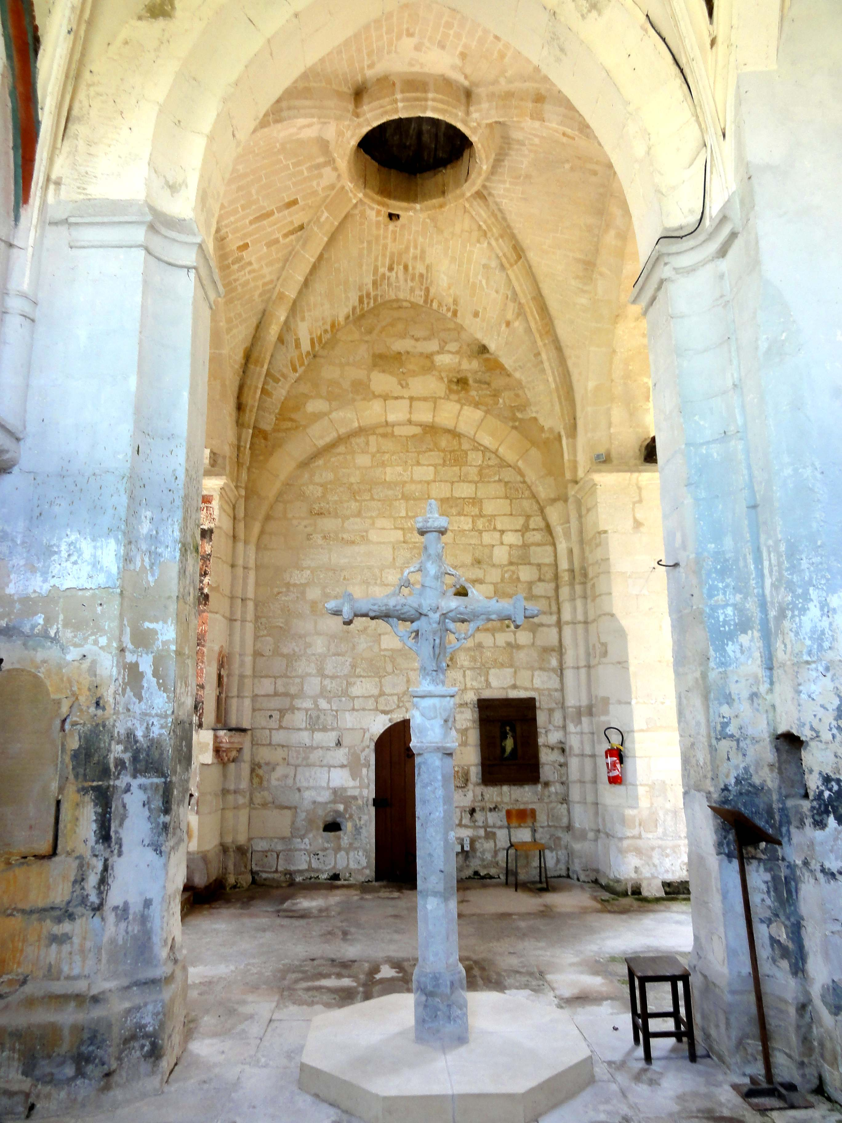 Intérieur de l'église (voir titre).